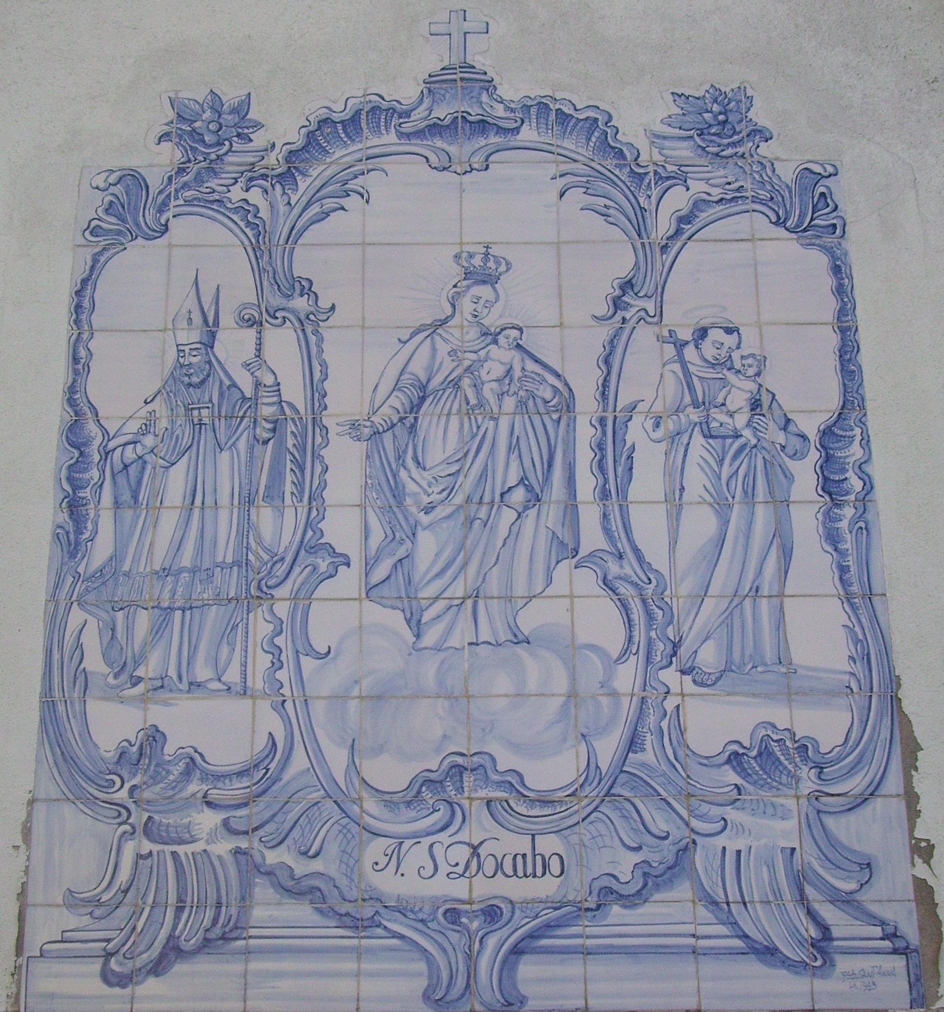 Autore: Massimo De Maria Descrizione: Pannello N.S. do Cabo Licenza: CC 2.0